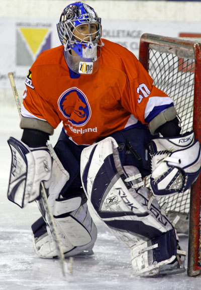 Phil Groeneveld, gardien de l'équipe nationale des Pays-Bas